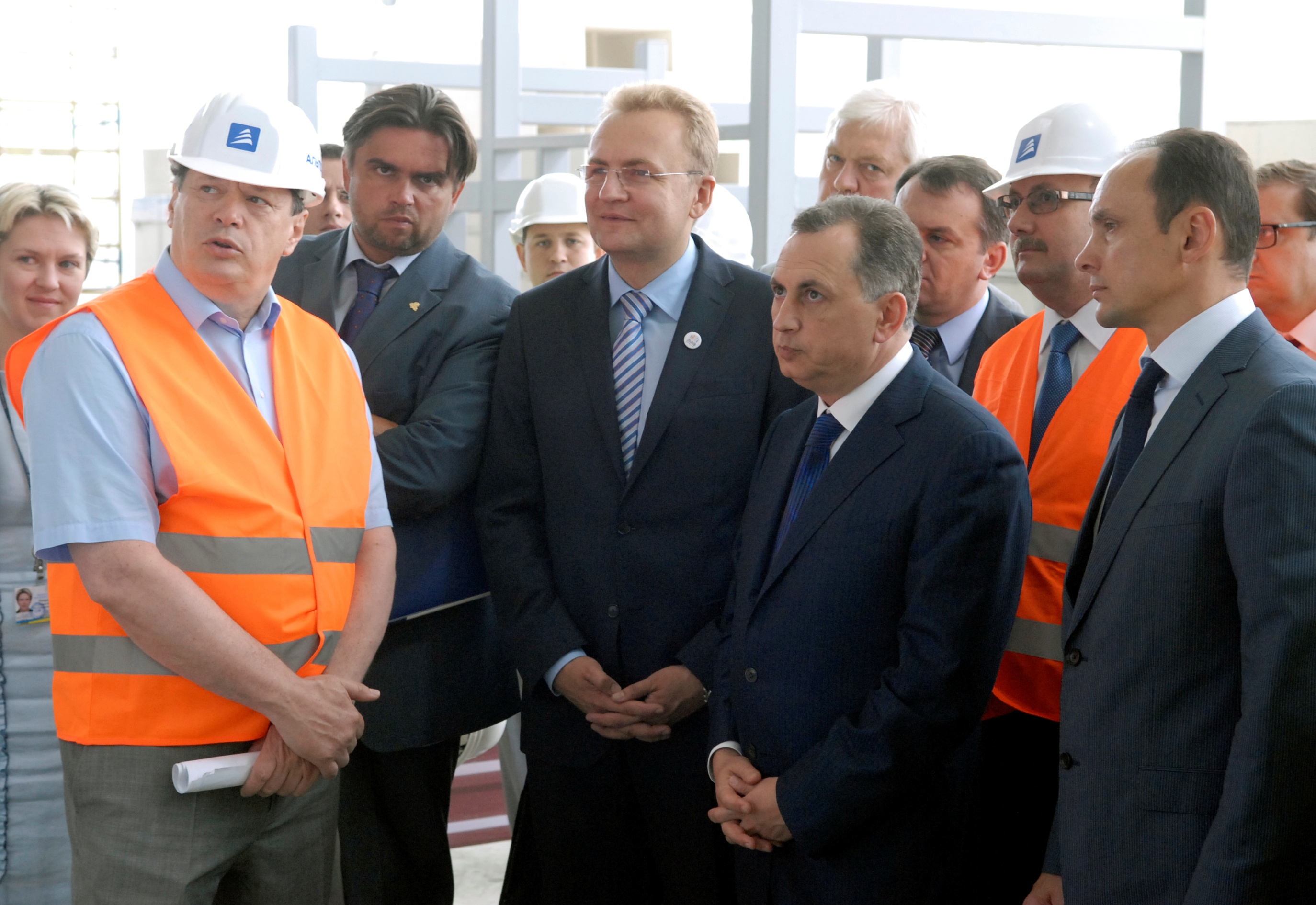 На єврооб'єктах